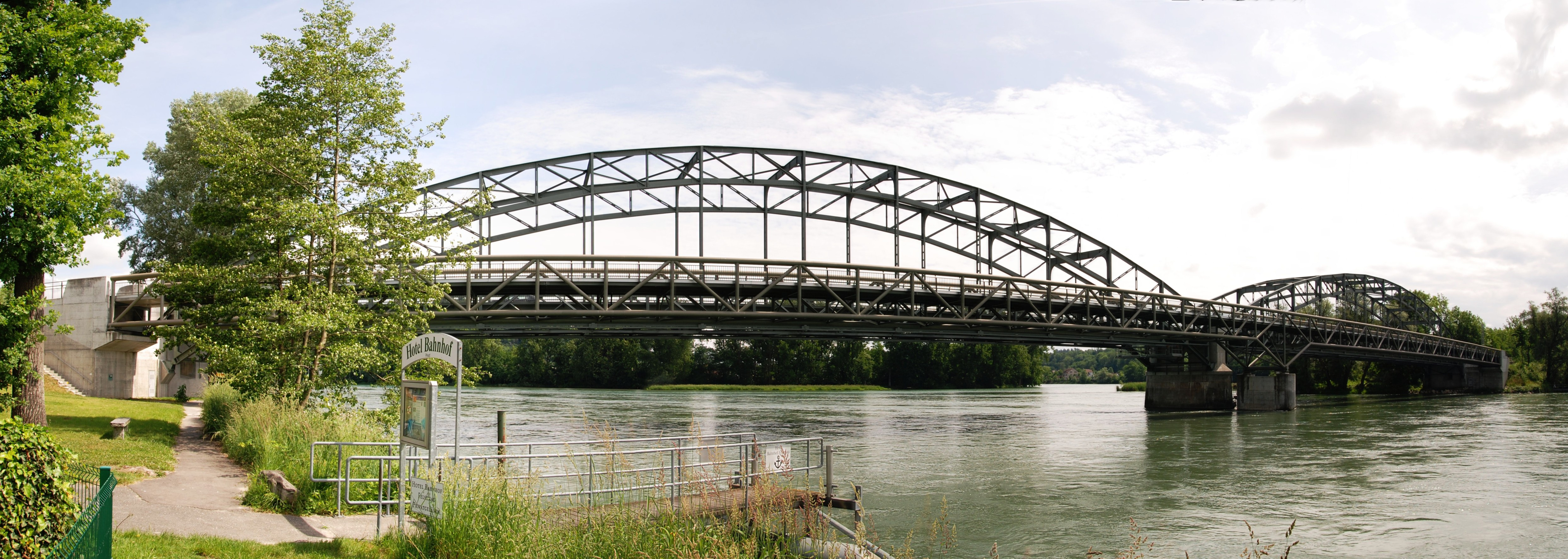 Mündung der Aare in den Rhein bei Koblenz (Schweiz)